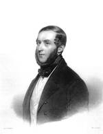 Stecher: Anonym Dargestellter: Graf Alexander Levin von Bennigsen Zeit: 19. Jh.